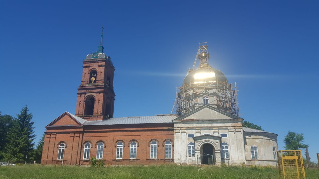 Церковь Святой Живоначальной Троицы вид сбоку 51.760689, 38.376257